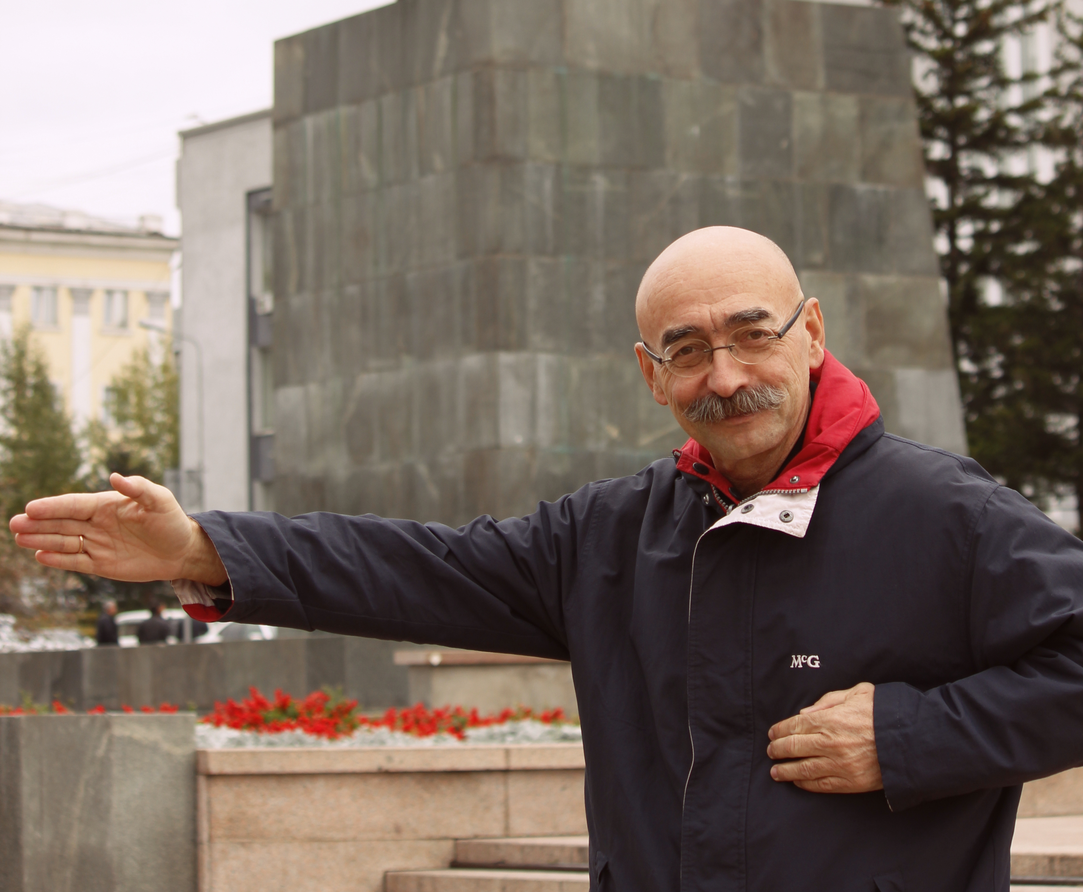 Художник-карикатурист Андрей Бильжо у памятника Ленину в Улан-Удэ, Бурятия, Сибирь.